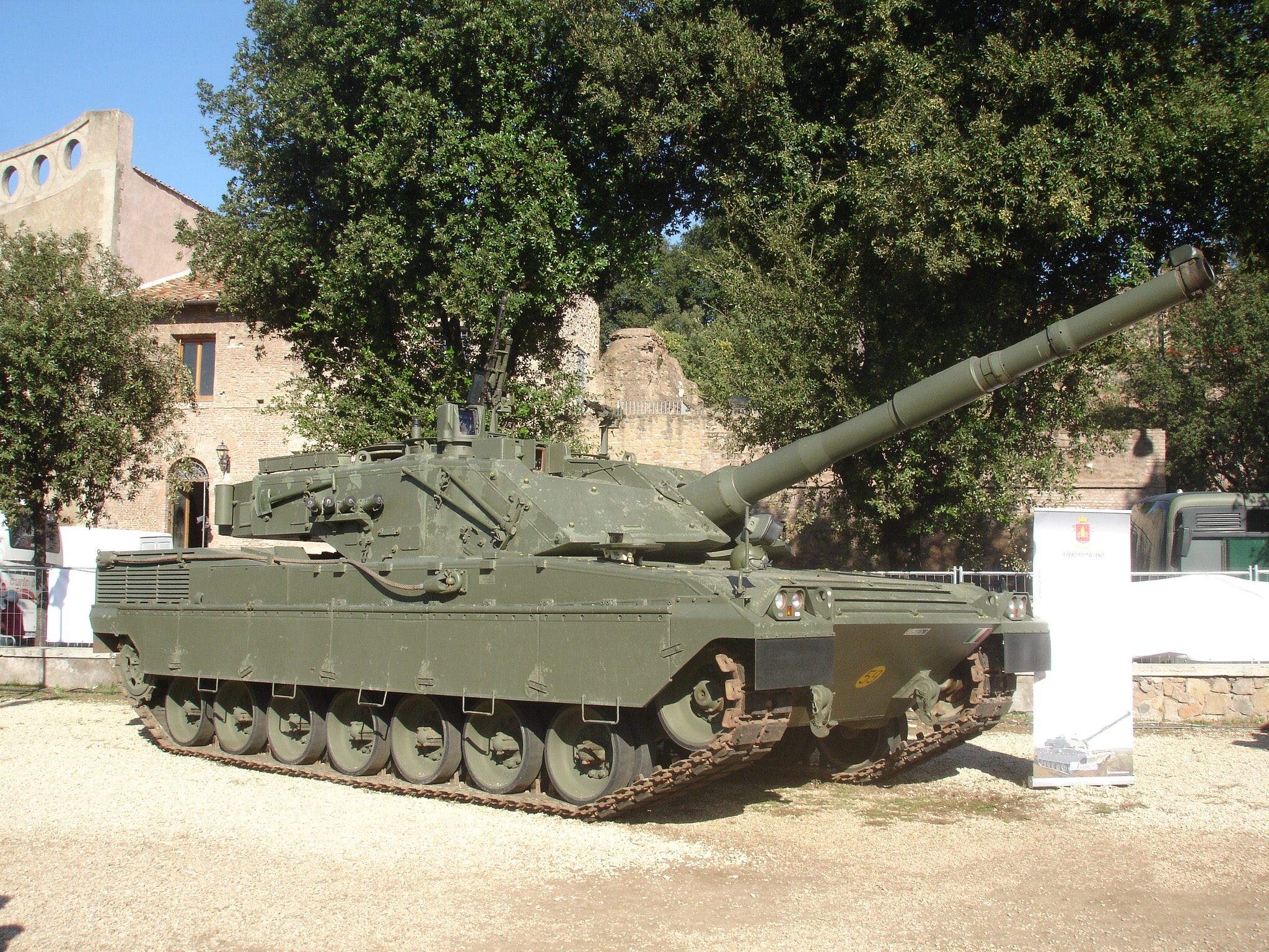 C1 Ariete a esposto Roma in occasione del 4 Novembre